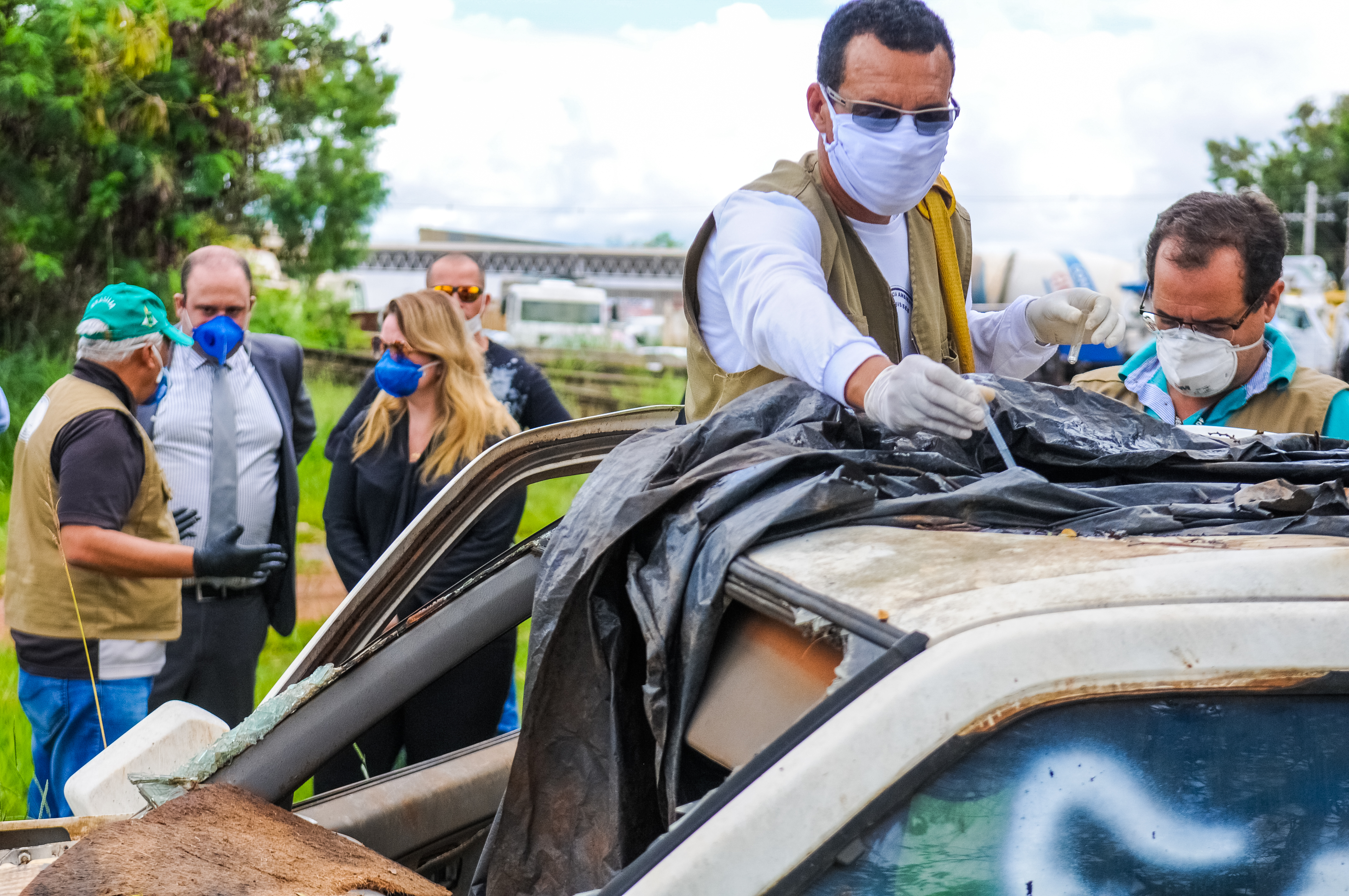 Uma operação conjunta do GDF retirou nove carcaças de veículos velhos abandonados em área pública no Setor de Indústria e Abastecimento (SIA) nesta sexta-feira (24/04). A ação faz parte das medidas de combate à dengue no DF e tem o objetivo de eliminar criadouros do mosquito Aedes aegypti. Foto: Paulo H. Carvalho/Agência Brasília